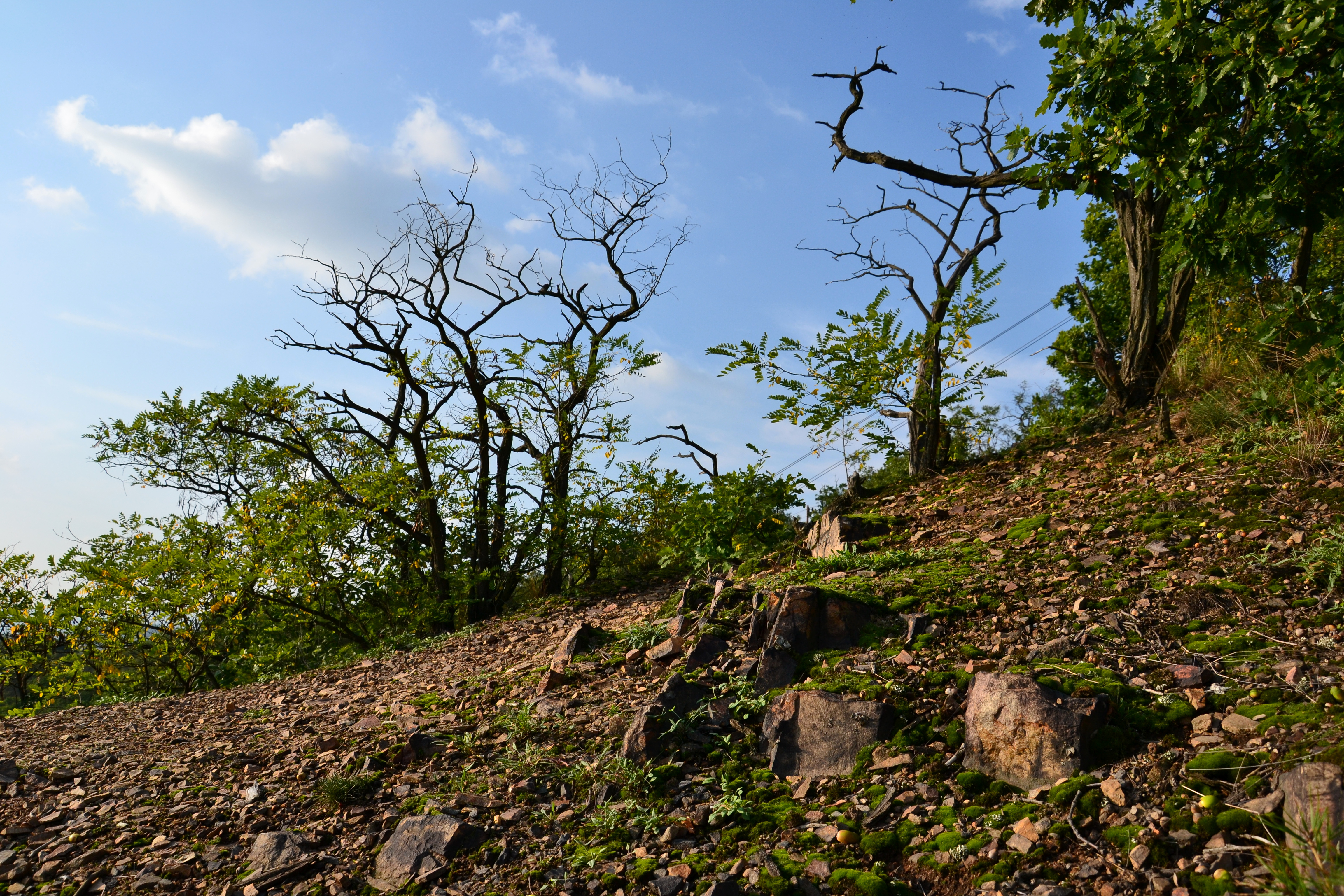 Přírodní památka Želinský meandr - suťový les u vyhlídky nad jezem